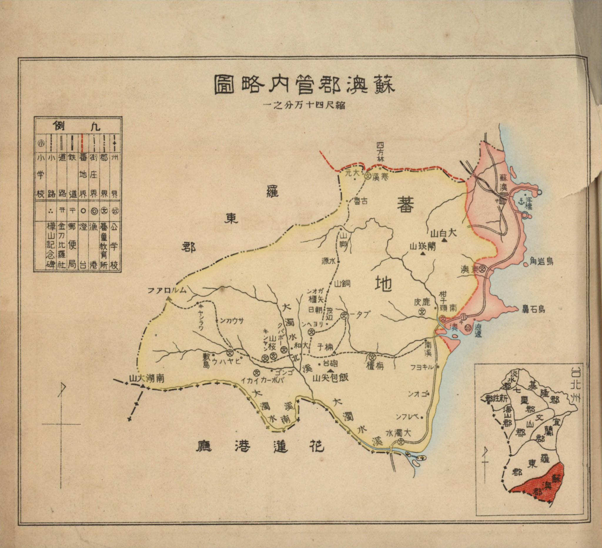 蘇澳郡管內圖，包含蘇澳庄及蕃地。